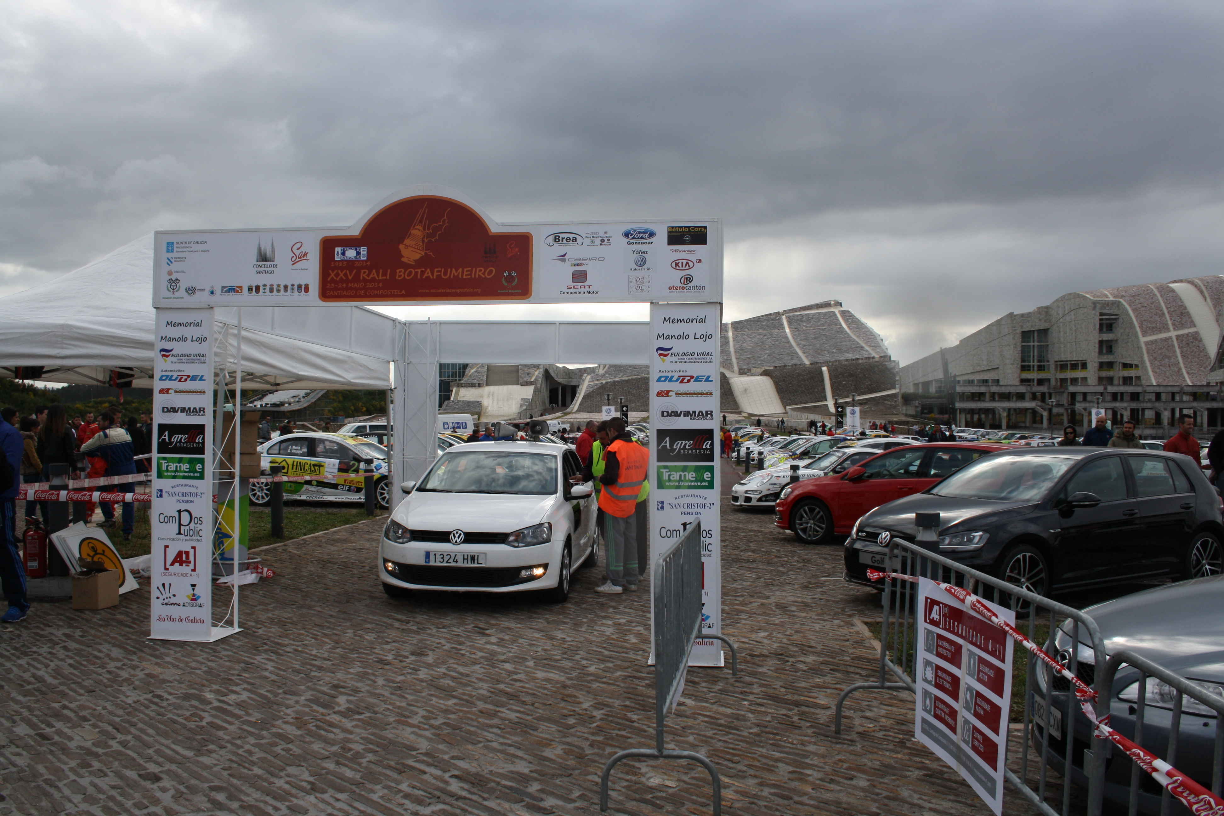 Rally Botafumeiro 2014. Parque cerrado ubicado en la Ciudad de la Cultura (GAIAS). Santiago de Compostela.